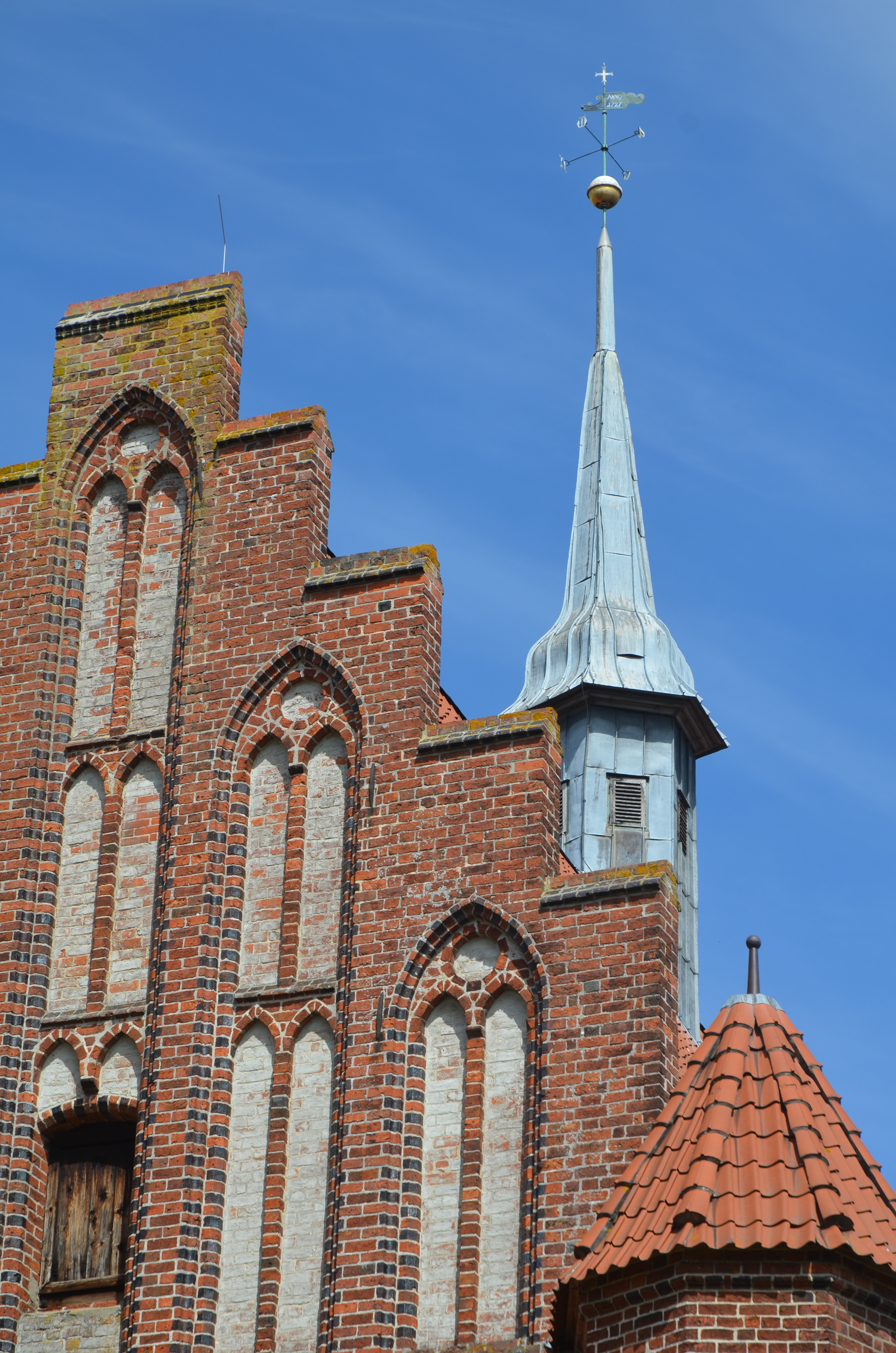 Im Dachreiter auf dem Nonnenchor mit der Wetterfahne von 1727 des Klostes Wienhausen findet sich die 1739 von dem Glockengießer Justus Andreas Meyfeld aus einer älteren Glocke neu gegossene und nach der Äbtissin benannte „Glocke der Agnes Maria von Hohnhorst“ ...